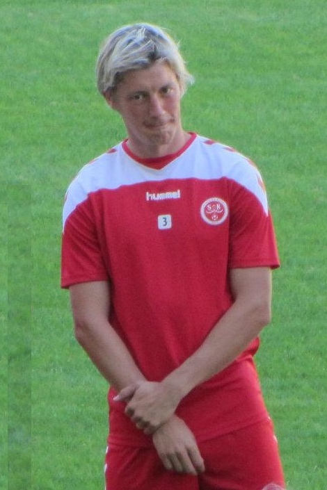 Franck Signiorino